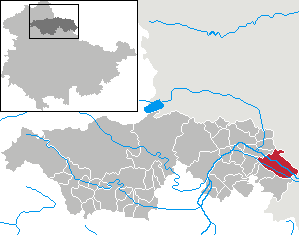 Roßleben in Thuringia - Kyffhäuserkreis